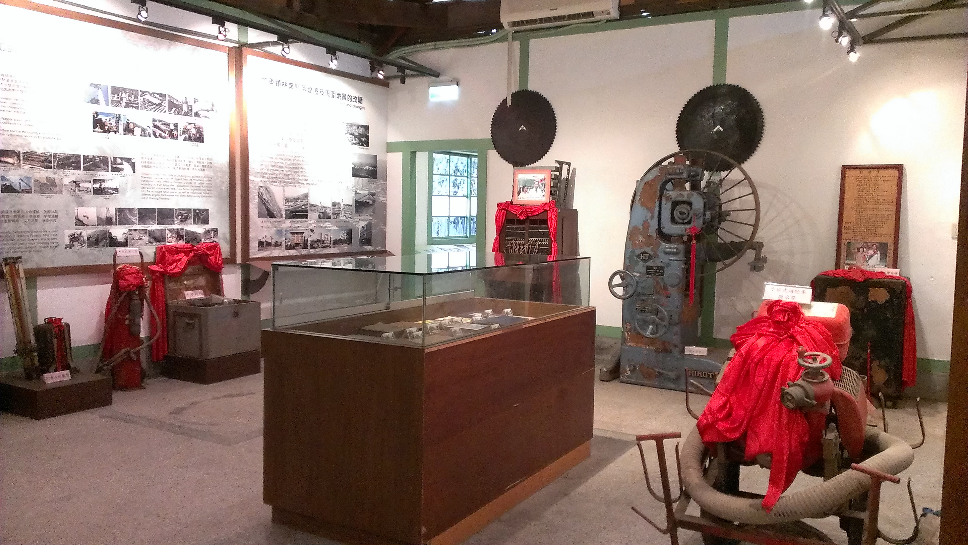 竹東林業展示館展示區